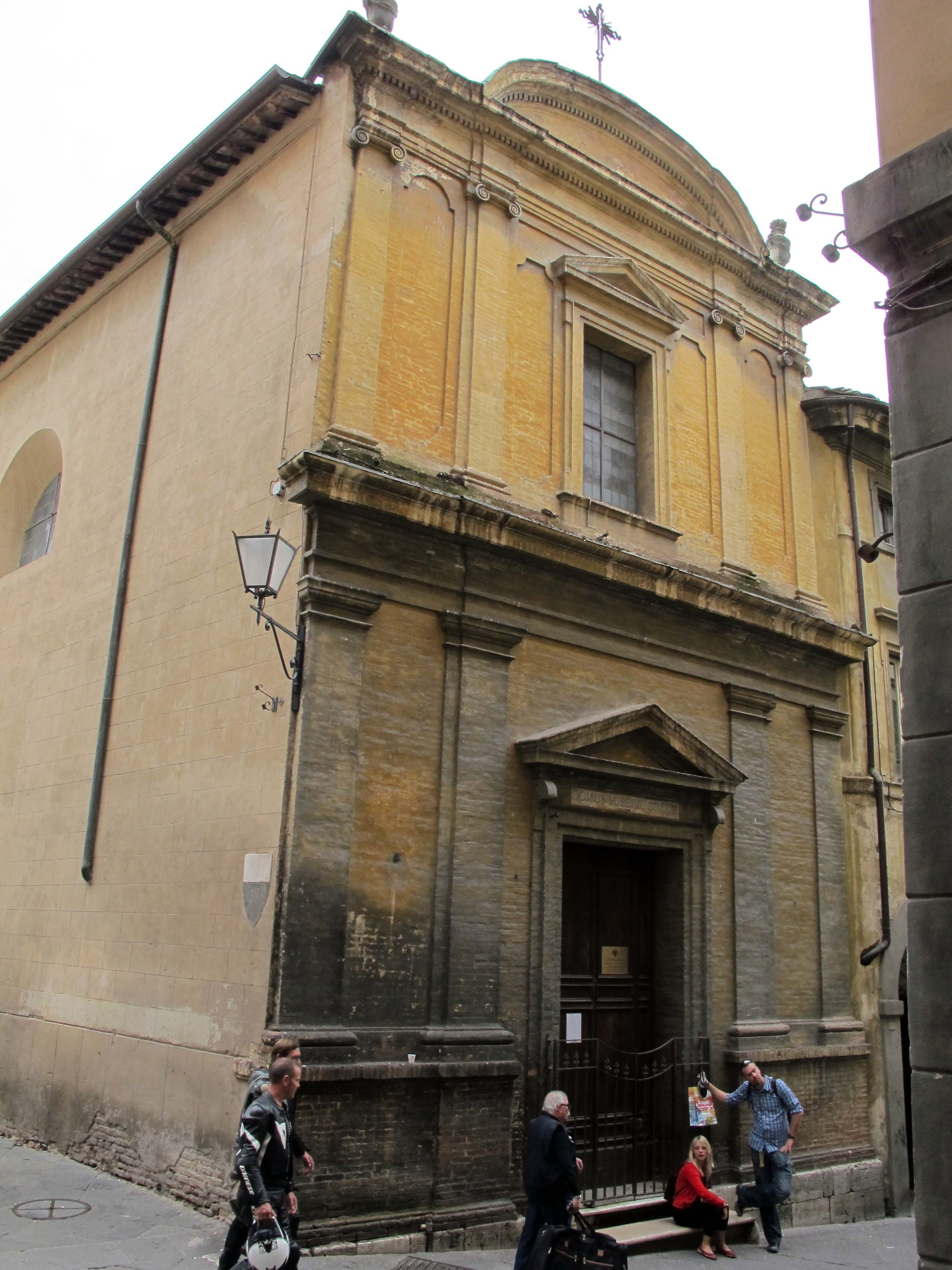 Via della Sapienza e via delle Terme, Siena